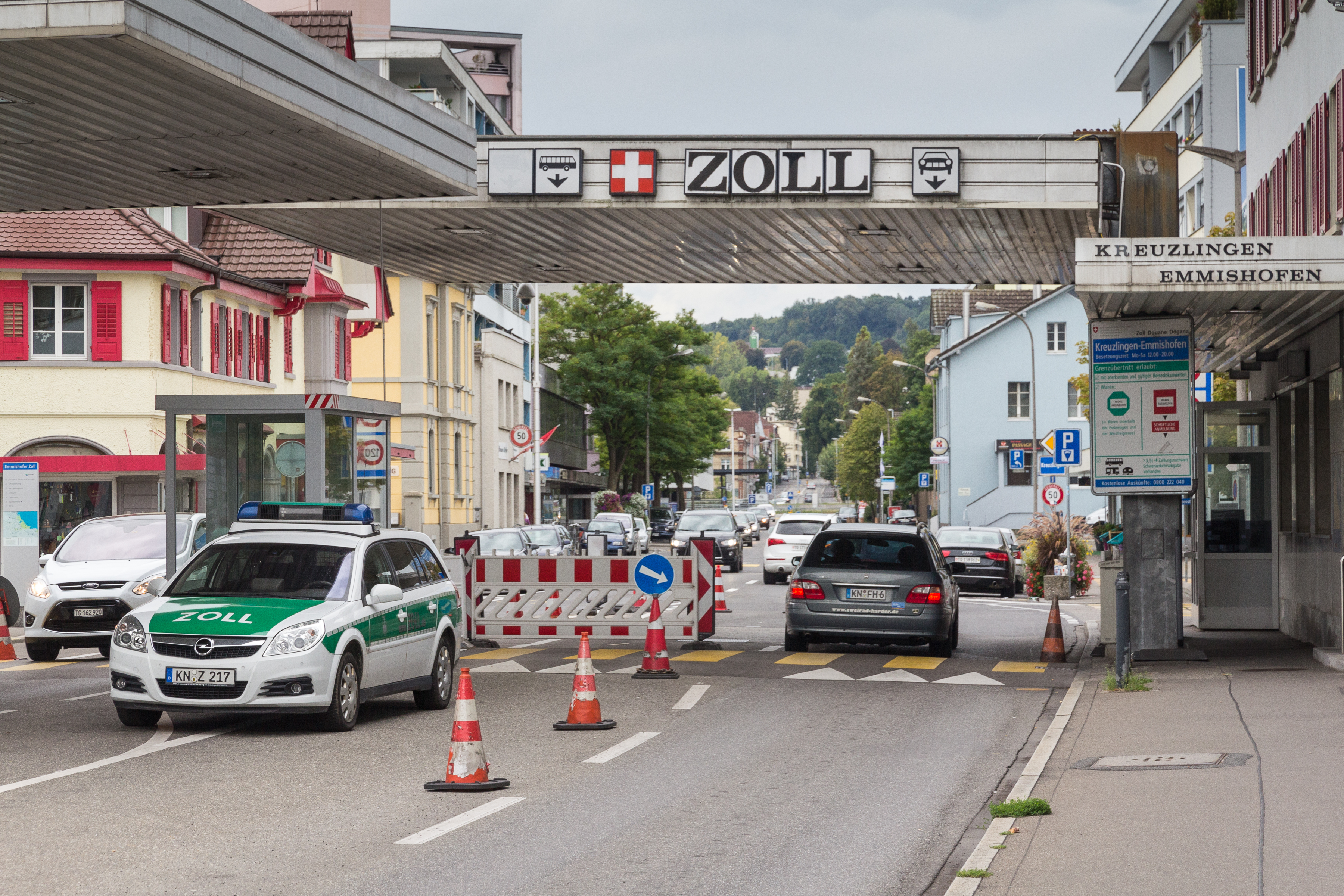 Emmishofer Zoll, Konstanz/Kreuzlingen